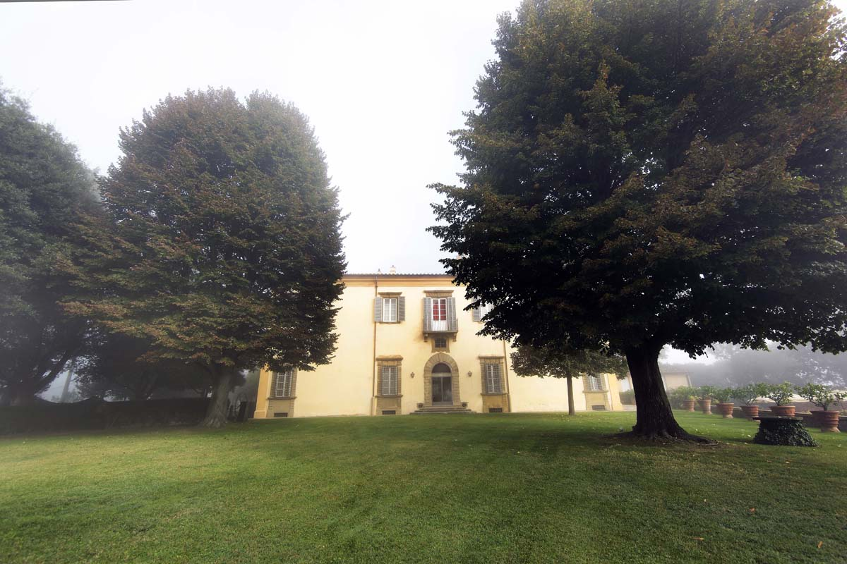 La Villa di Castiglioni dei Marchesi de' Frescobaldi (Montespertoli, Firenze)